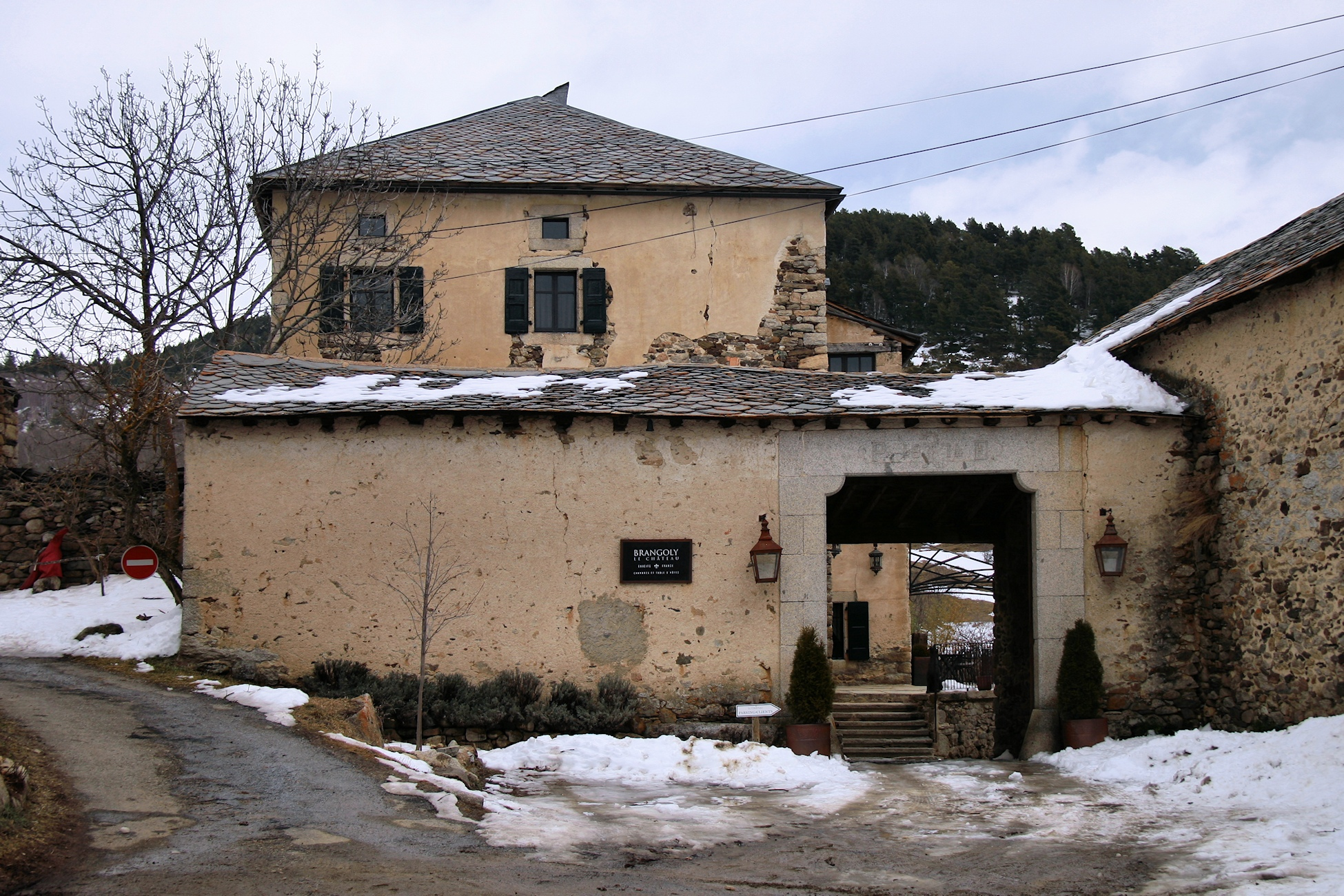 Château de Brangoly